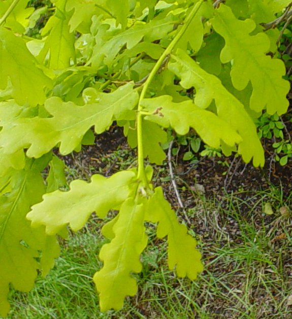 Quercus × rosacea (Quercus robur × Quercus petraea) Späda ekblad. Foto Olof Ekström 2004.